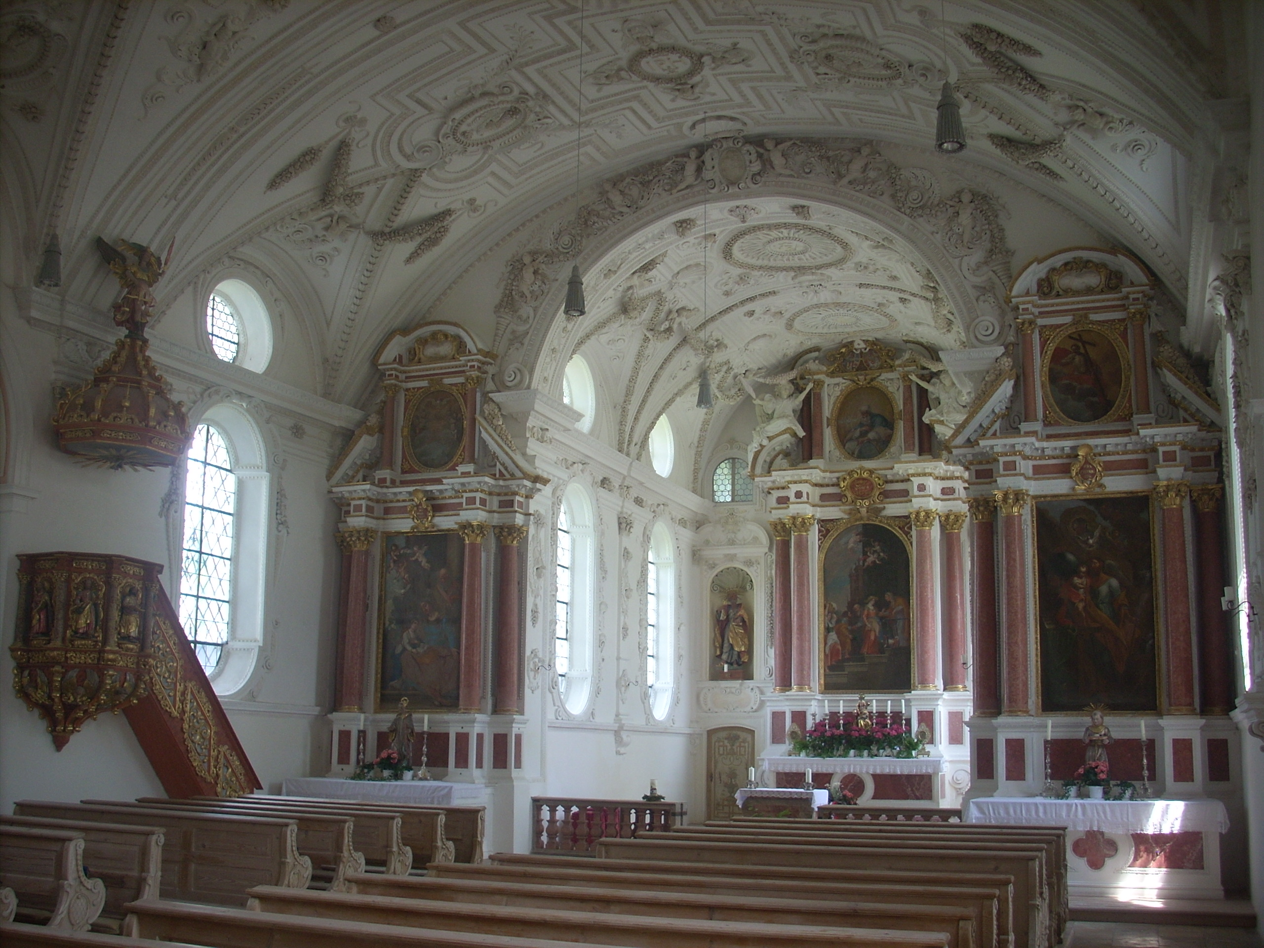 Steingaden-Ilgen, Wallfahrtskirche, Inneres